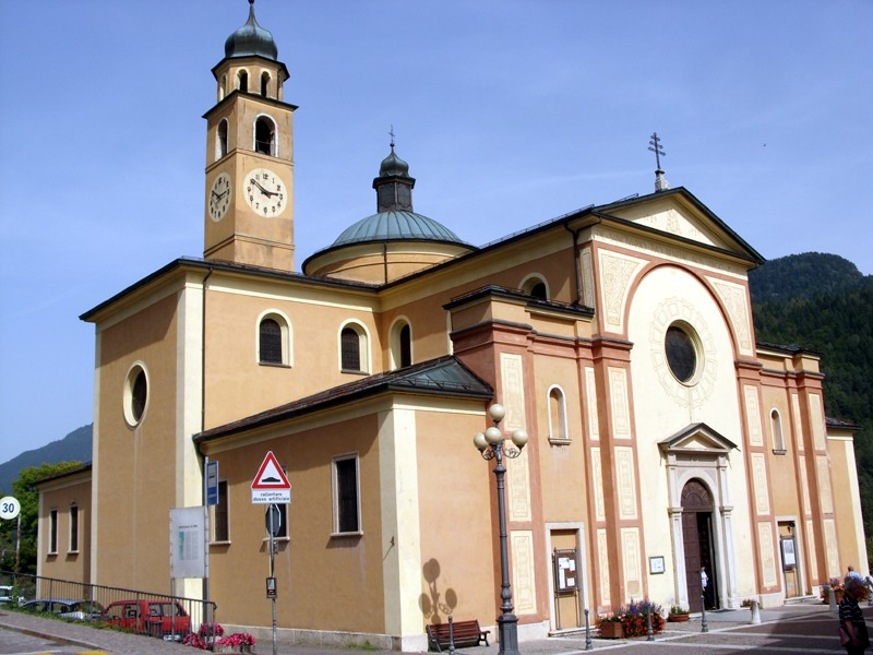 Montagnaga - Santuario della Madonna di Piné